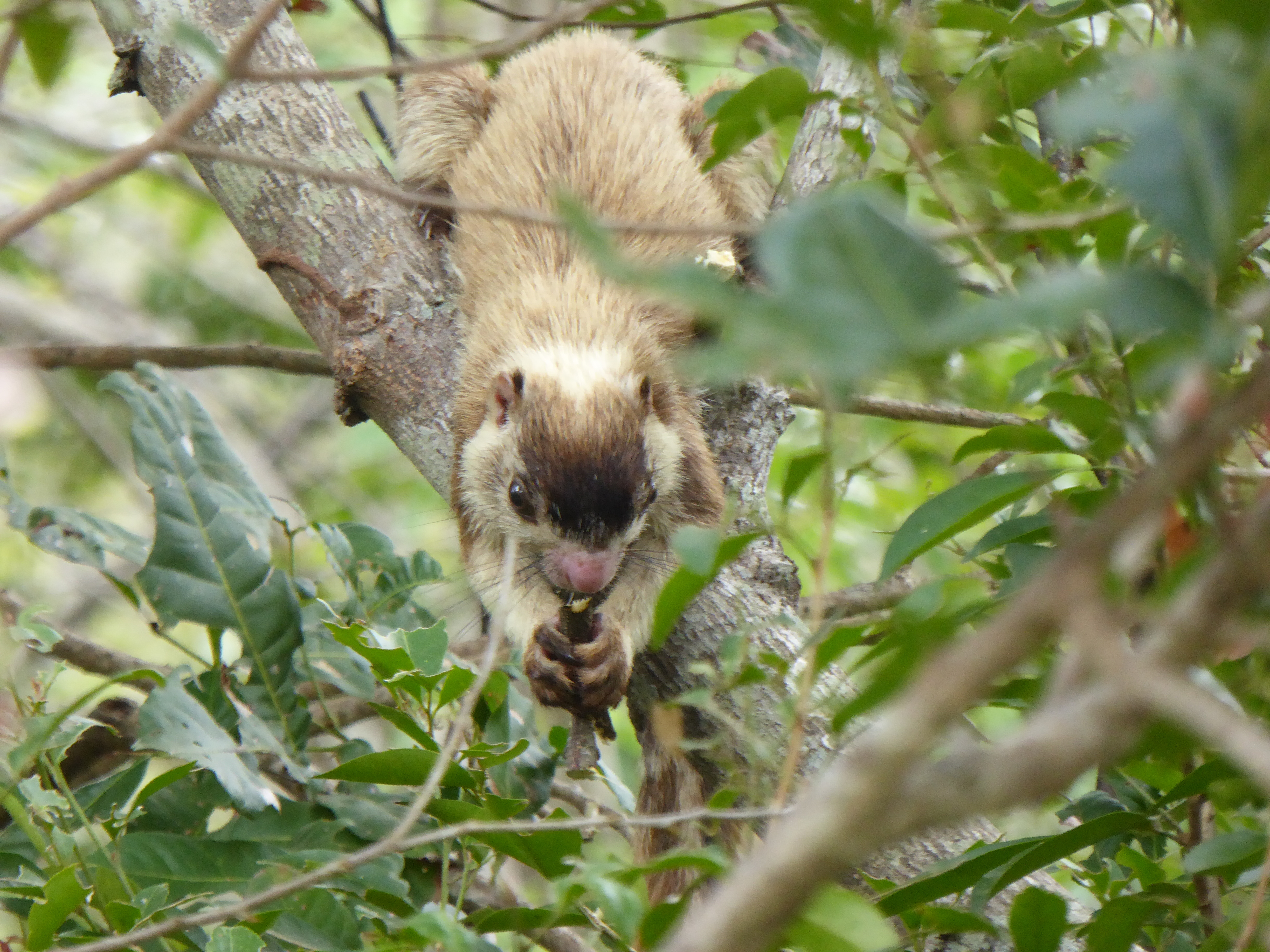 Rongeur sri-lankais.